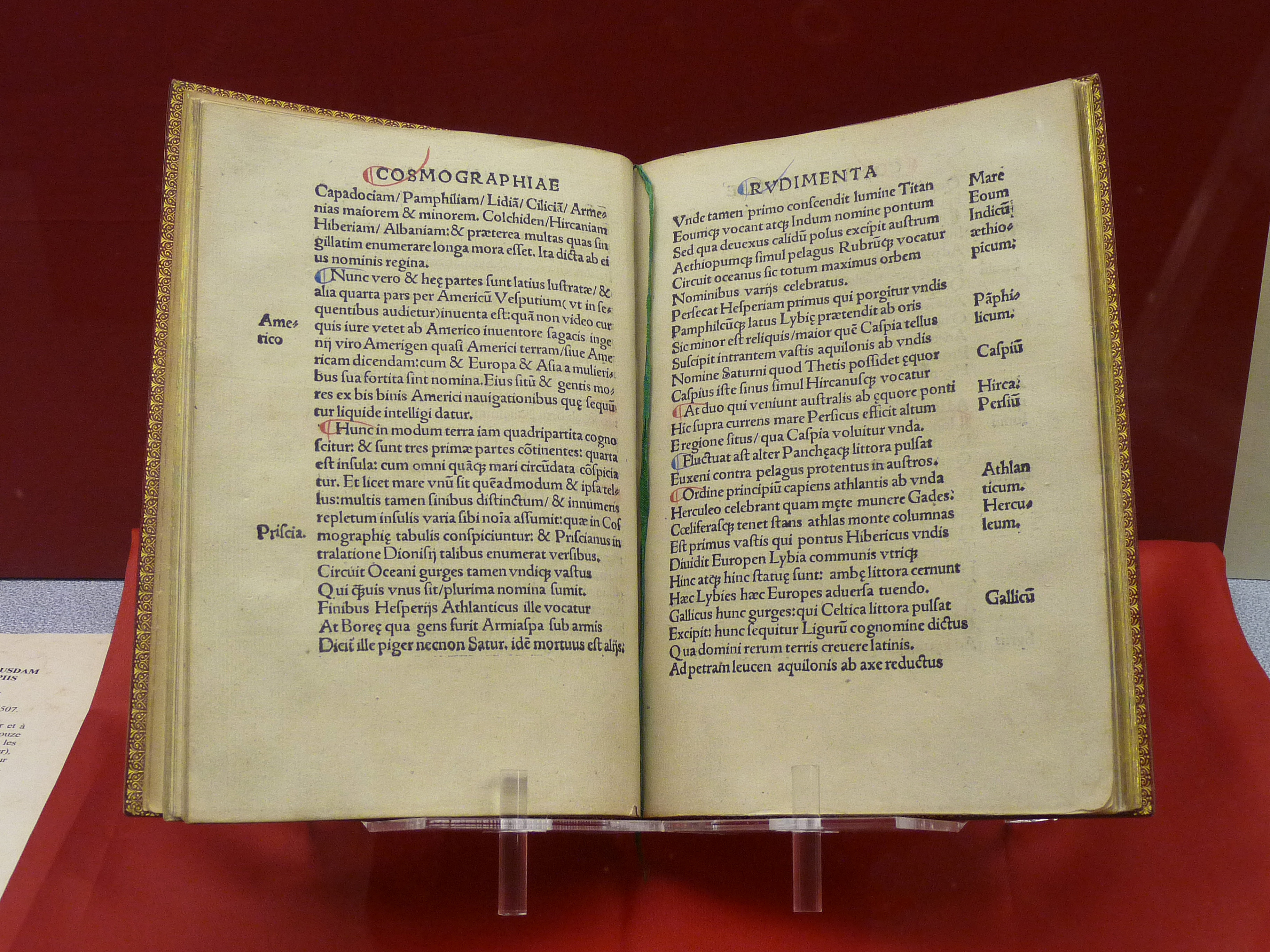 Un des exemplaires de la troisième édition de Cosmographiae Introductio imprimée à Saint-Dié en 1507. Petit traité de géographie qui accompagnait la carte du monde Universalis Cosmographia. Conservé dans la salle du Trésor de la Médiathèque Victor-Hugo de Saint-Dié-des-Vosges